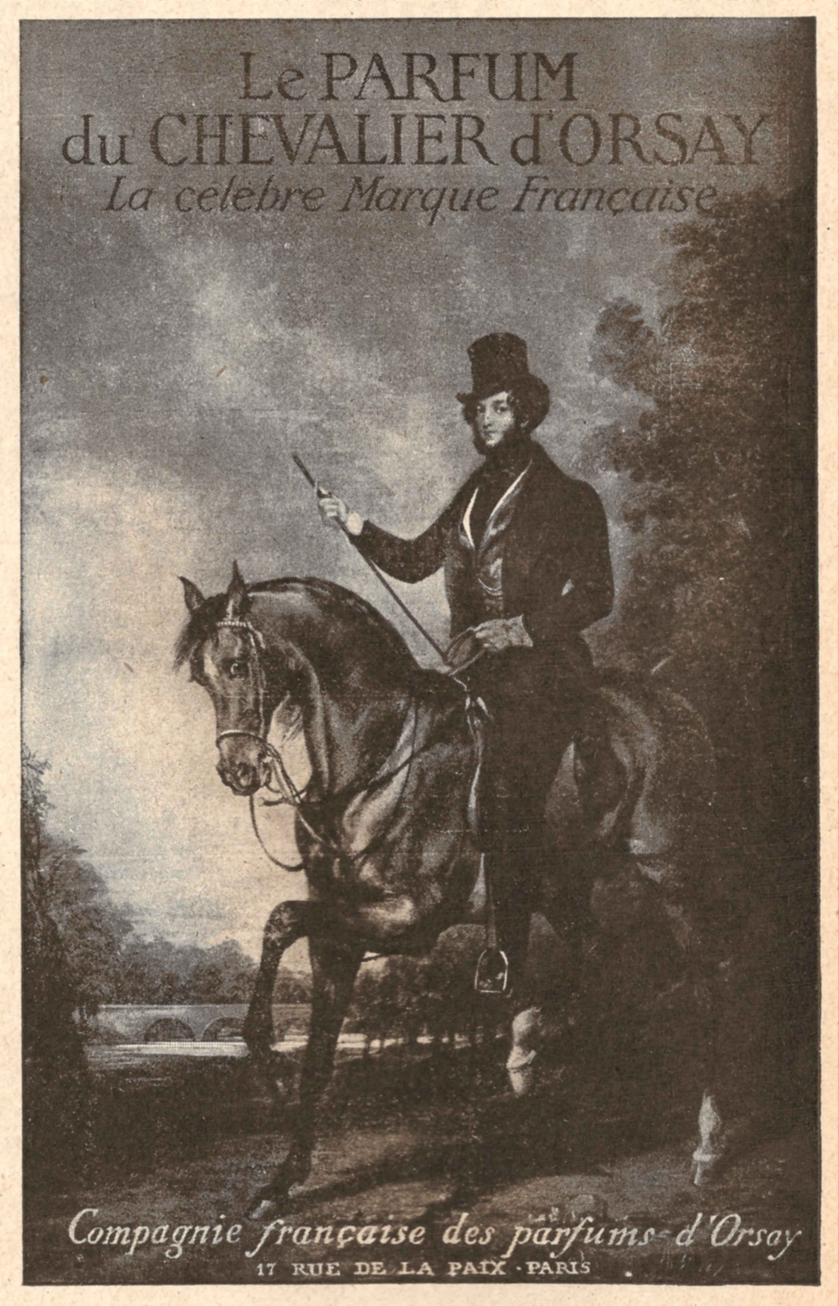 Scan of an advertisment of L'ILLUSTRATION, 2 Février 1918, No 3909 Le PARFUM du CHEVALIER d'ORSAY.